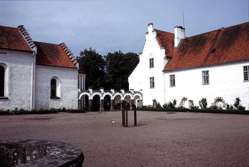 Bosjö Kirke i Danmark. Kirke og kloster